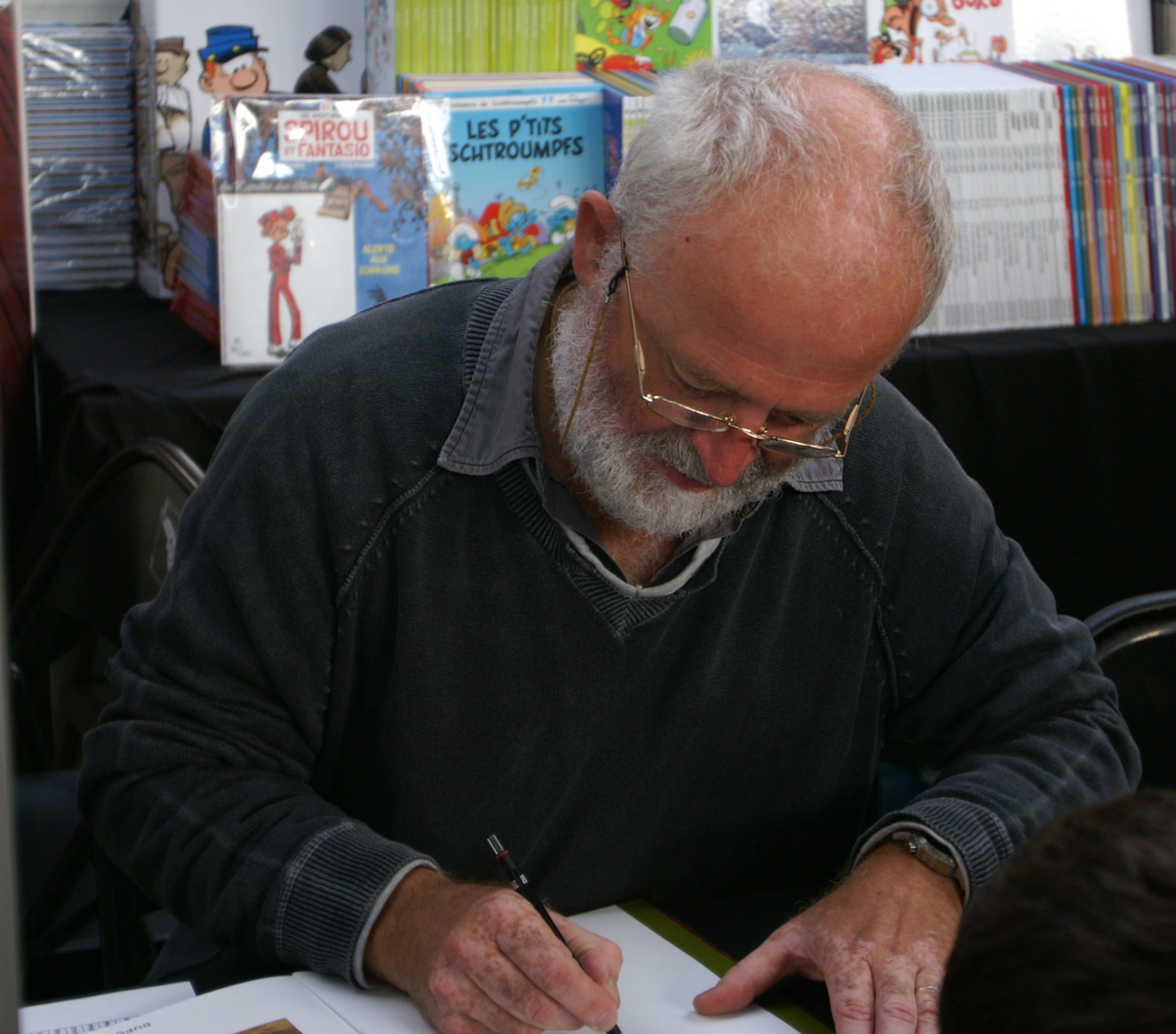 Jean-Claude Servais au festival Quai des Bulles à Saint-Malo en 2010.